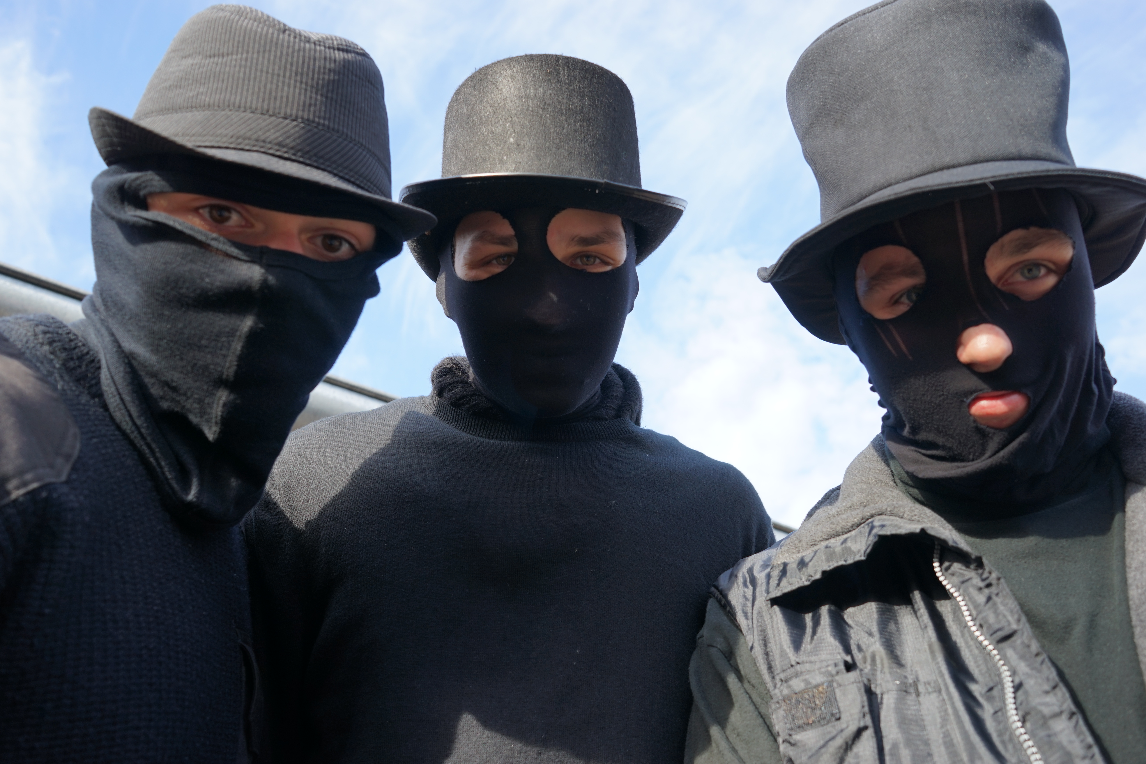 Siwki w Chobienicach odbywają się co roku w pierwszy dzień świąt Wielkanocnych. Grupy przebierańców zatrzymują samochody pobierając opłaty, grają i śpiewają na ulicach malując sadzą twarze mieszkańców, smagają rzemieniami łydki przechodniów. Zbierają dary i rozmawiają z chętnymi do udziału mieszkańcami. Pochód trwa od godzin południowych do późnego popołudnia.